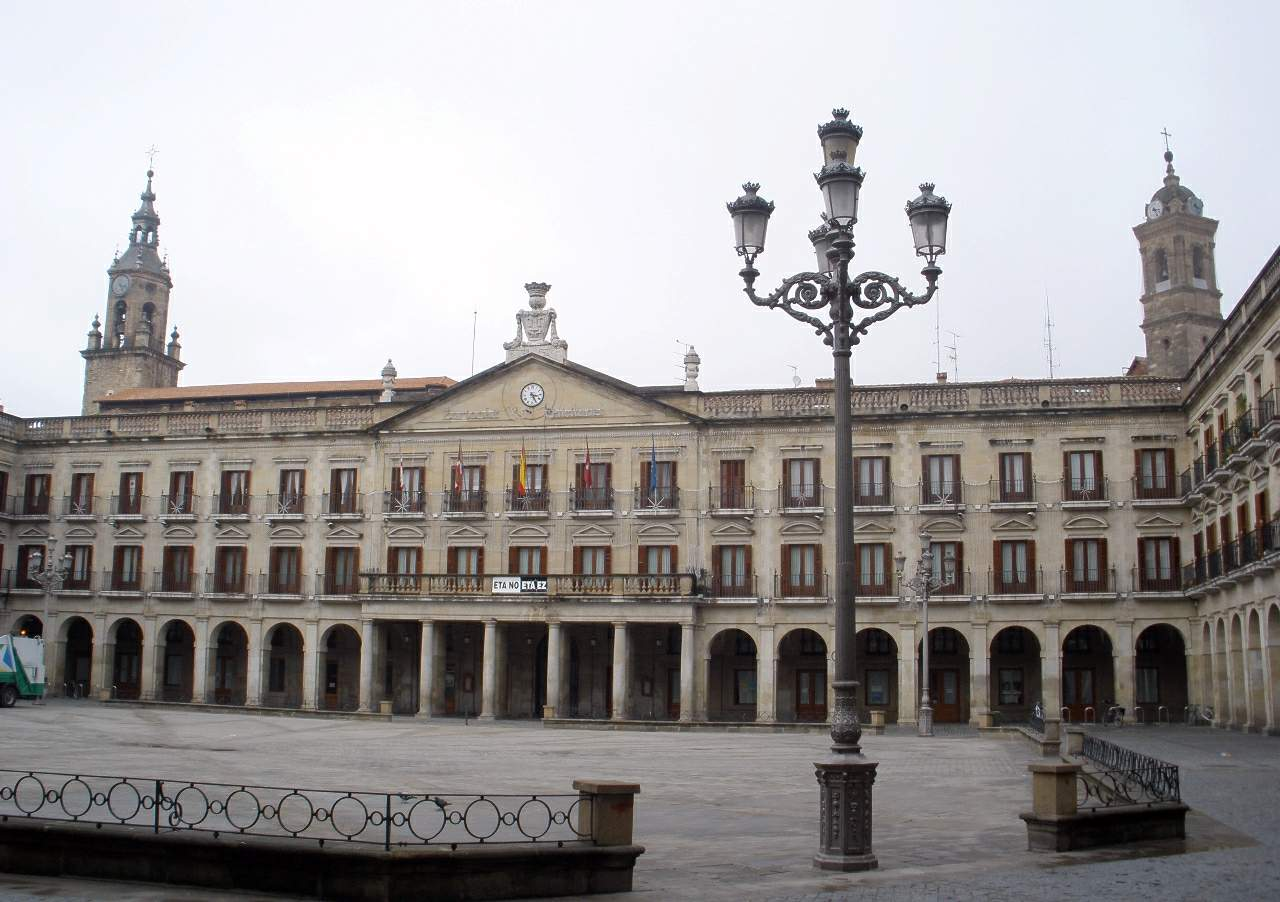 Plaza Nueva y Ayuntamiento, Vitoria-Gasteiz